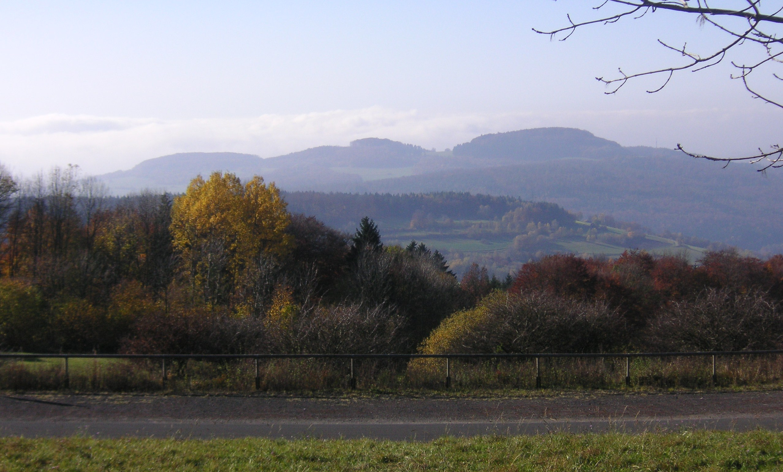 Die drei Pilsterköpfe östlich von Bad Brückenau - aufgenommen in der Nähe des Berghauses Rhön